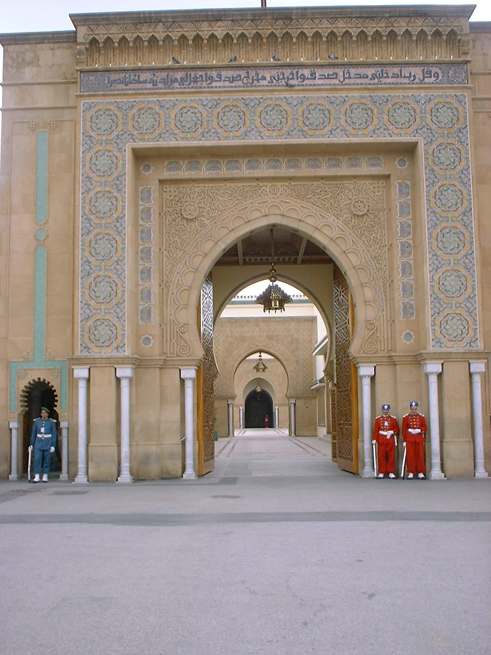 Tor am Königspalast in Rabat